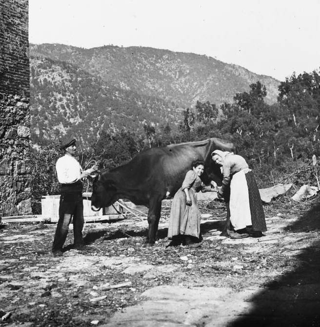 Tres pagesos munyint una vaca a La Begis (Santa Coloma de Farners)